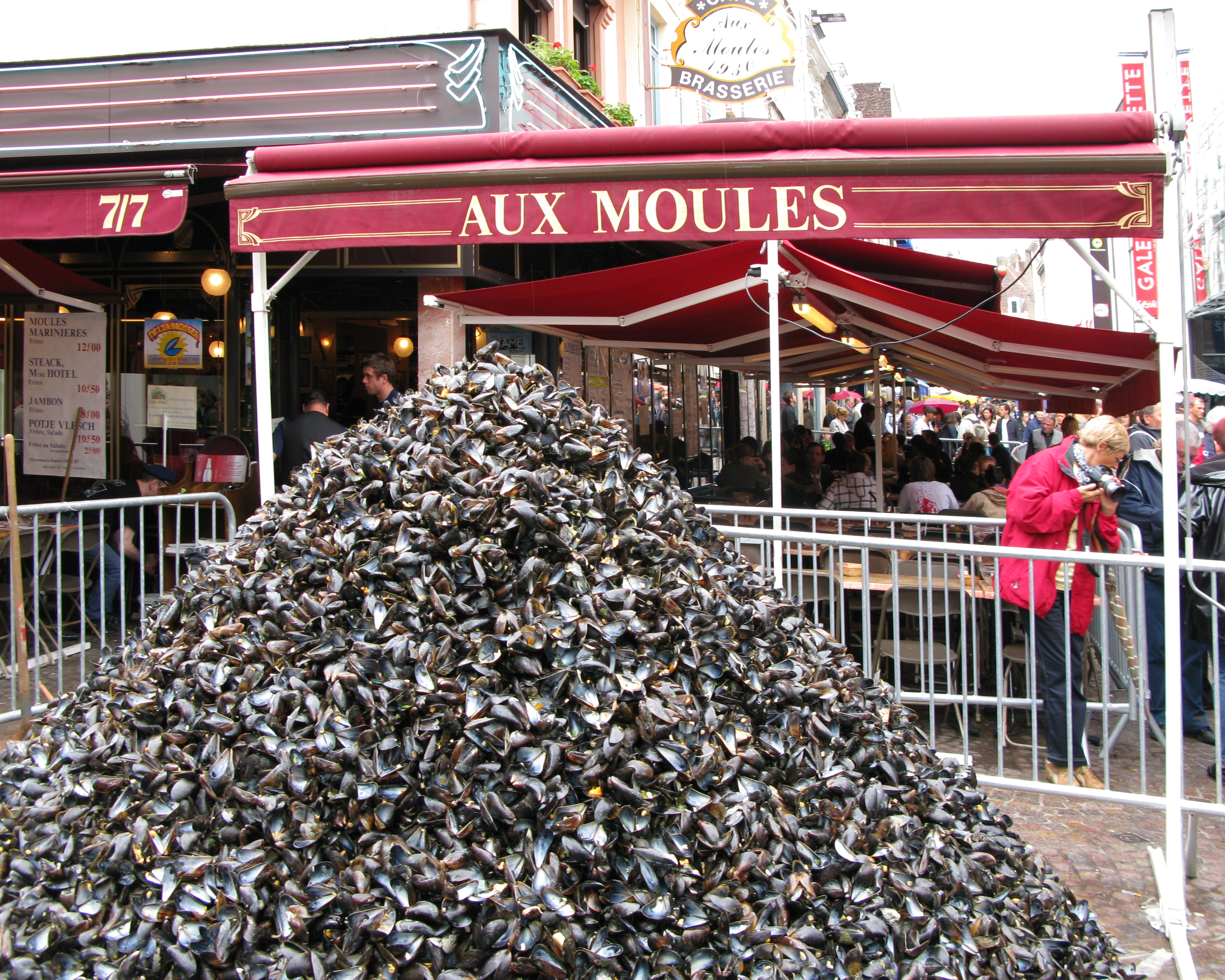 Tas de moules du restaurant « Aux Moules », rue de Béthune, lors de la braderie de Lille.